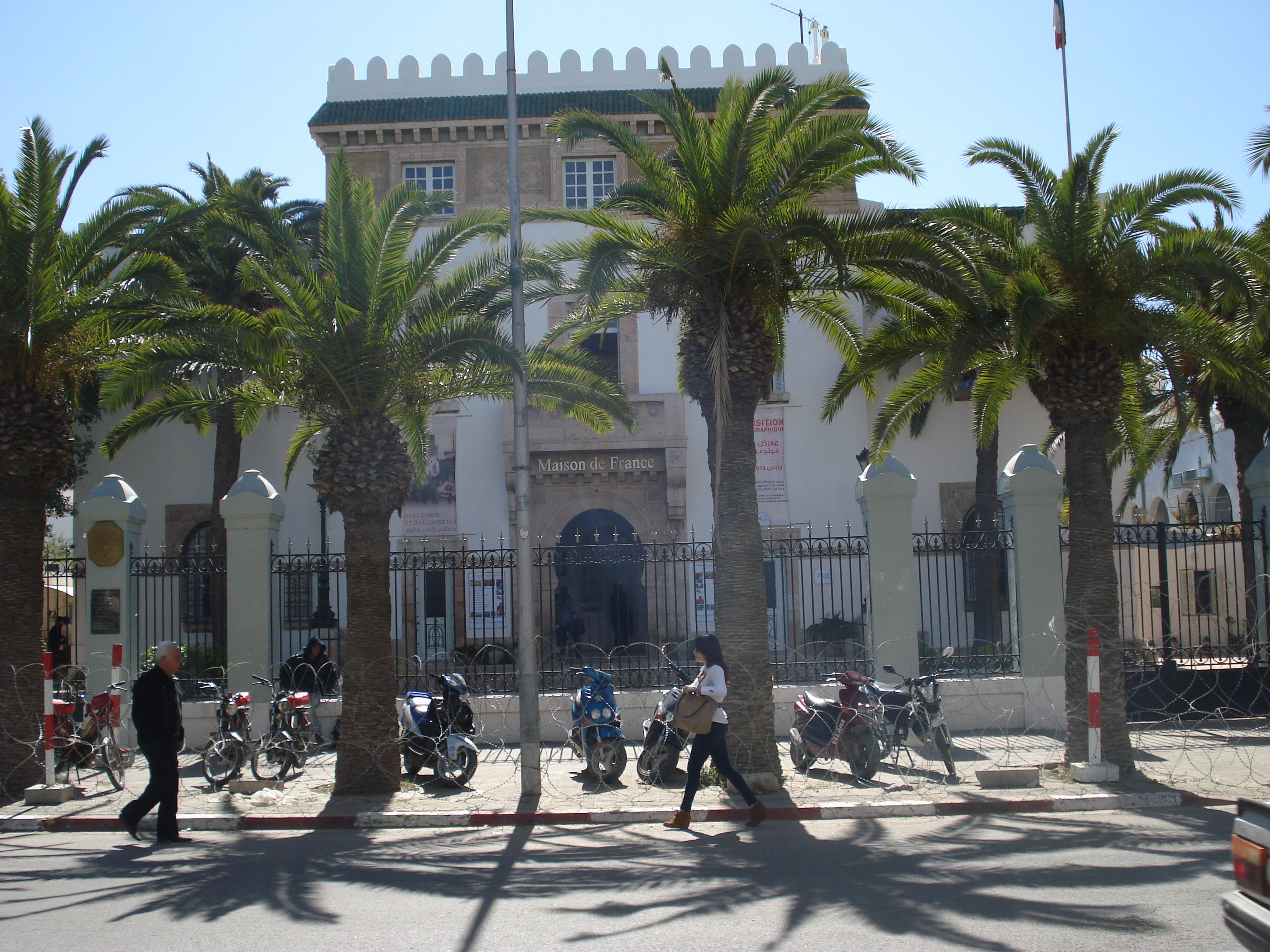 Maison de France in Sfax, Tunesien.